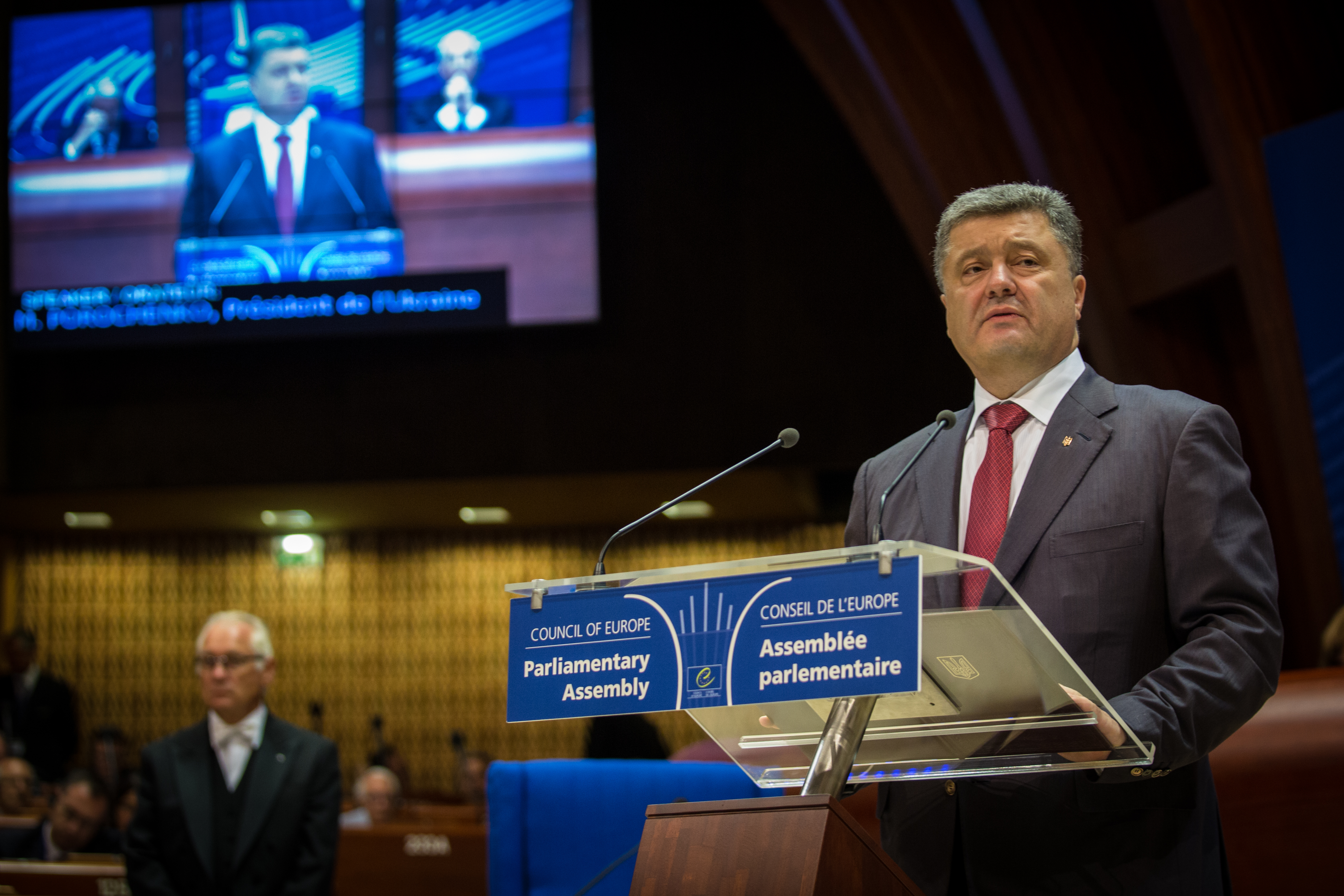 Visite officielle du Président de la République d’Ukraine Petro Porochenko au Conseil de l’Europe, Strasbourg 26 juin 2014.